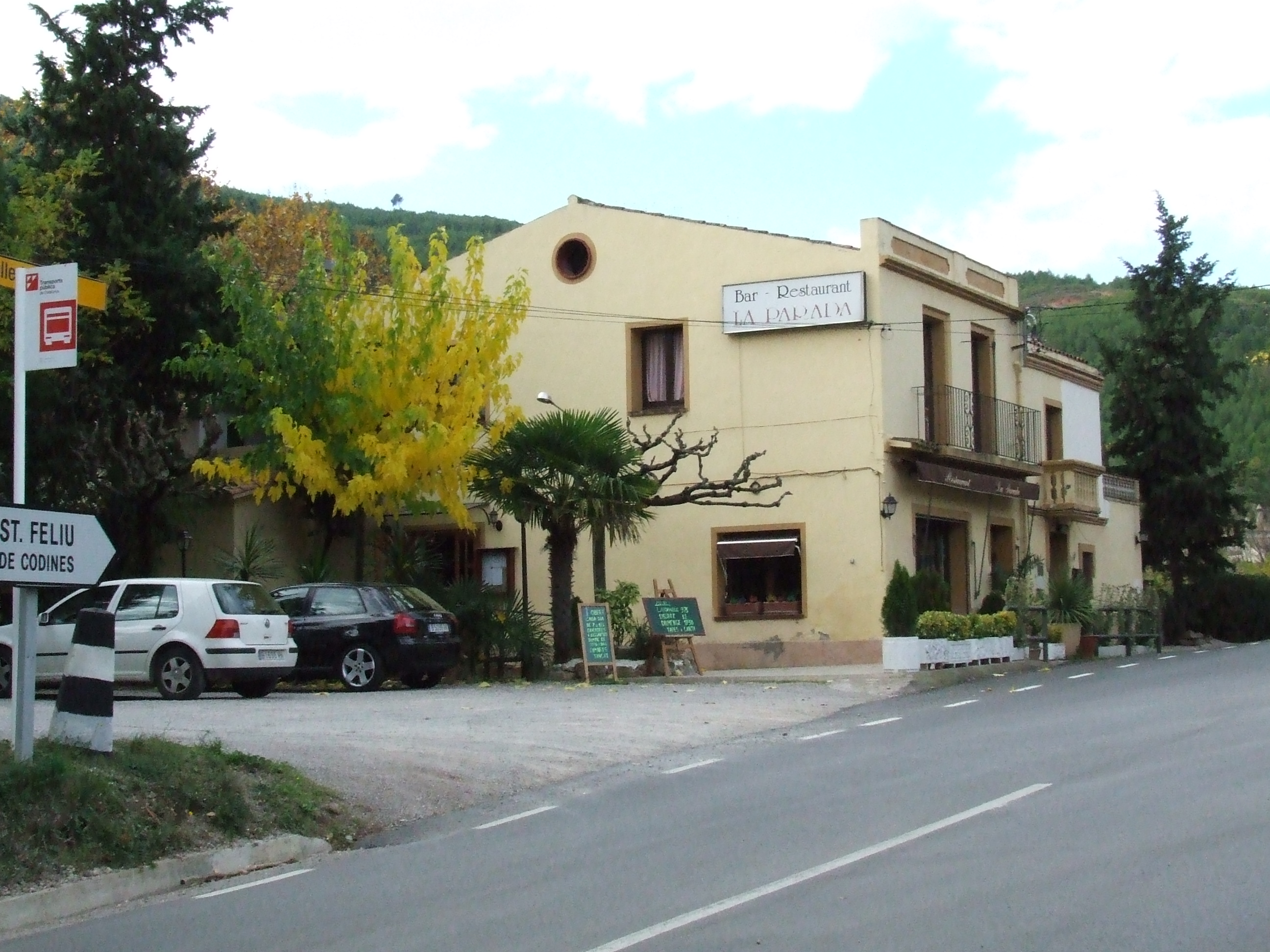 La Parada (Riells del Fai, Bigues i Riells, Vallès Oriental)